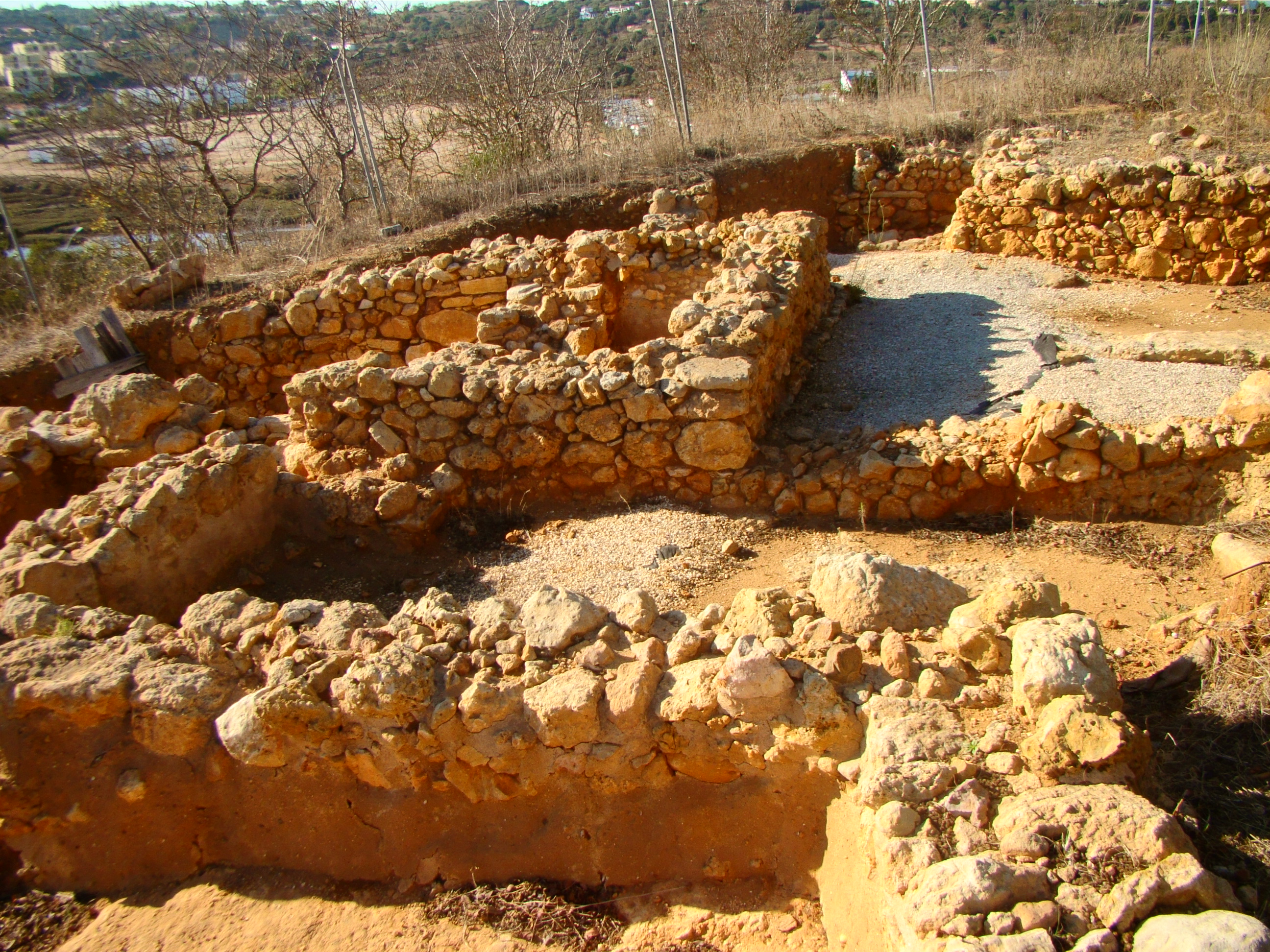 Monte Molião - Compartimentos IV - 08.11.2017